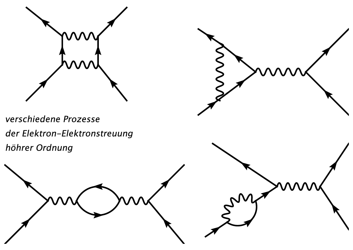 Prozesse höherer Ordnung bei der Elektron-Elektronstreuung im Feynmangraph Selber gezeichnet